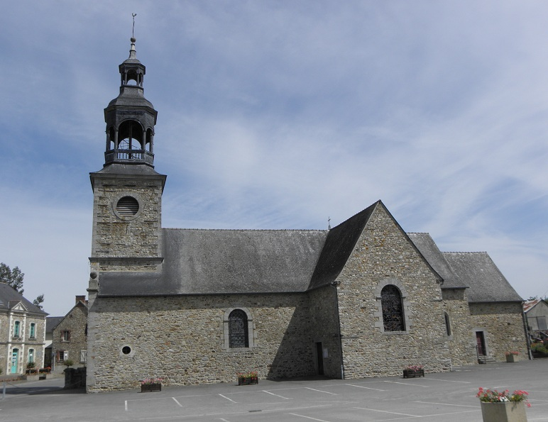 Église Saint-Pierre à Taillis (35).